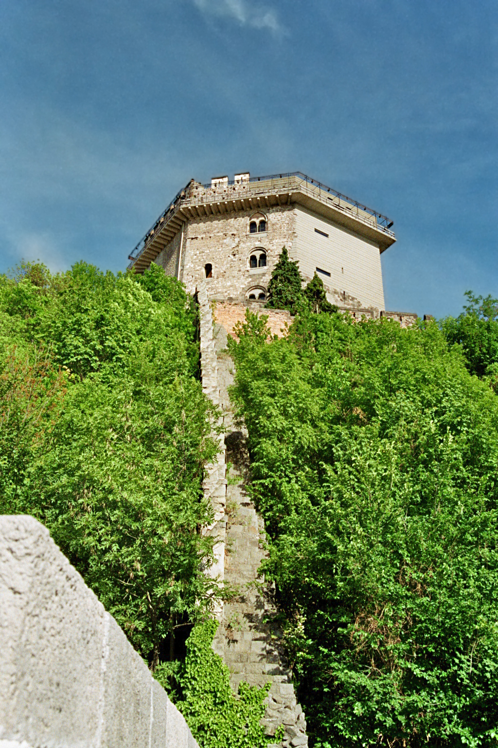 Der Salomonturm (ungarisch: Salamon-torony): Kernwerk der mittelalterlichen Verteidigungsbastion „Untere Burg“ am Ostrand der Stadt Visegrád im ungarischen Komitat Pest.